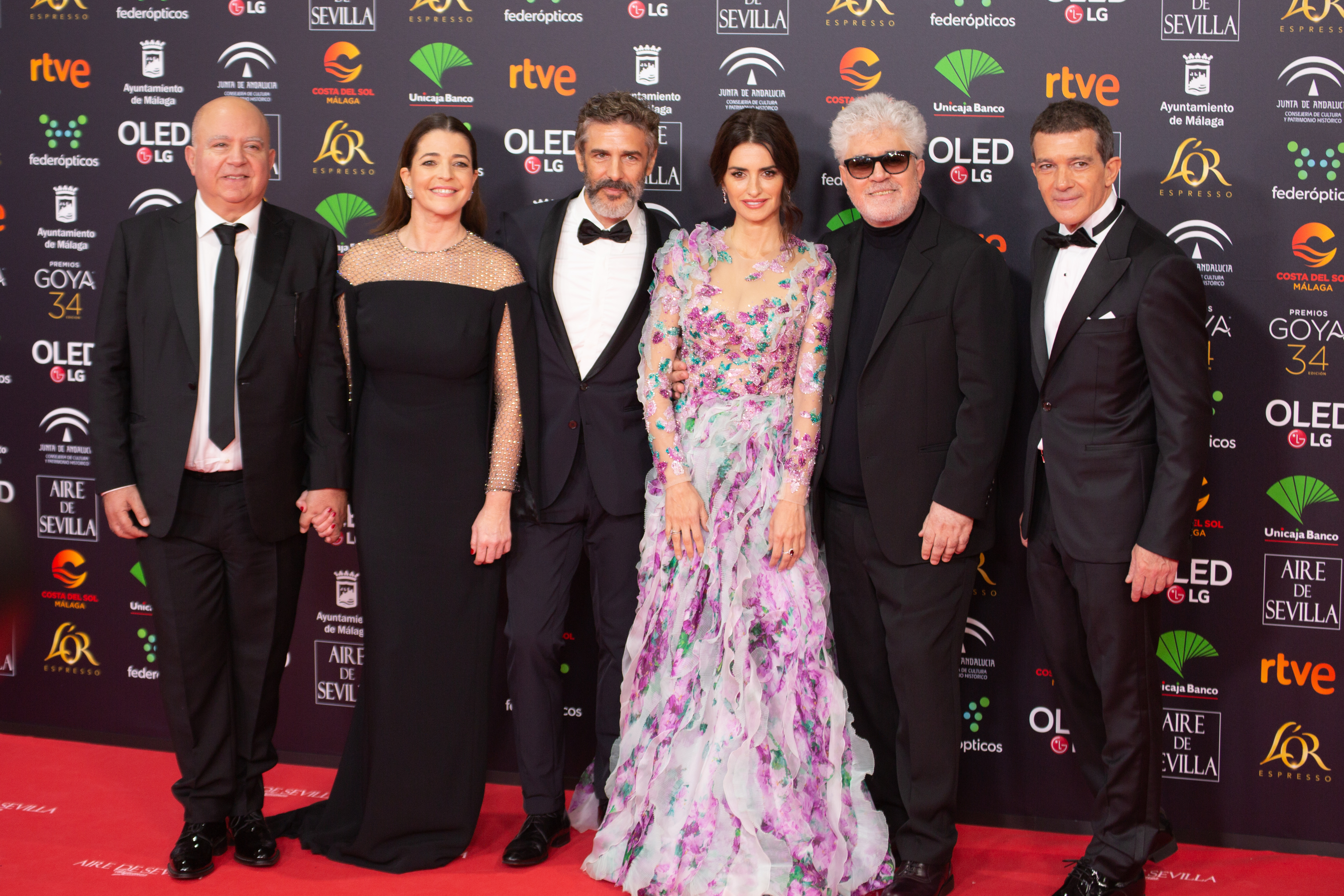 Equipo de la película Dolor y gloria en la alfombra roja de la ceremonia de entrega de los Premios Goya 2020, celebrados en Málaga